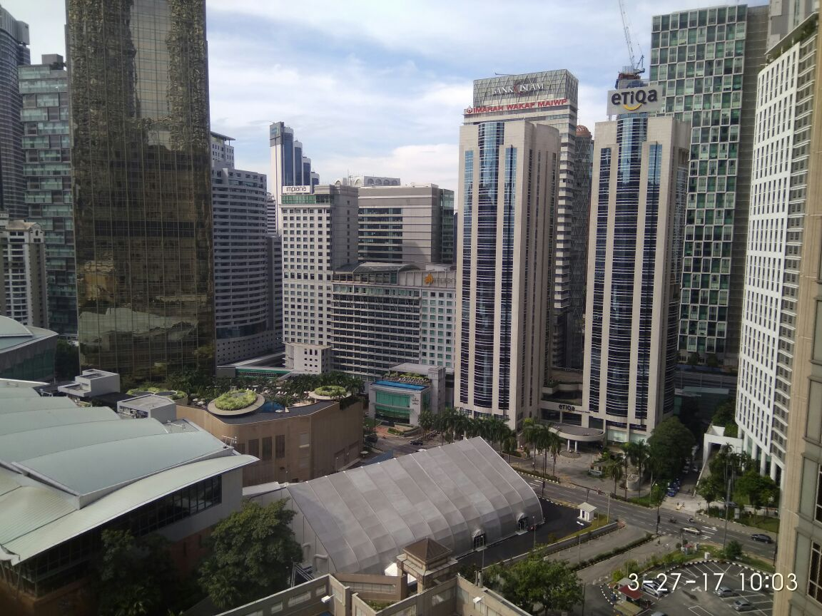 Bank Islam, Kuala Lumpur, Malaysia.